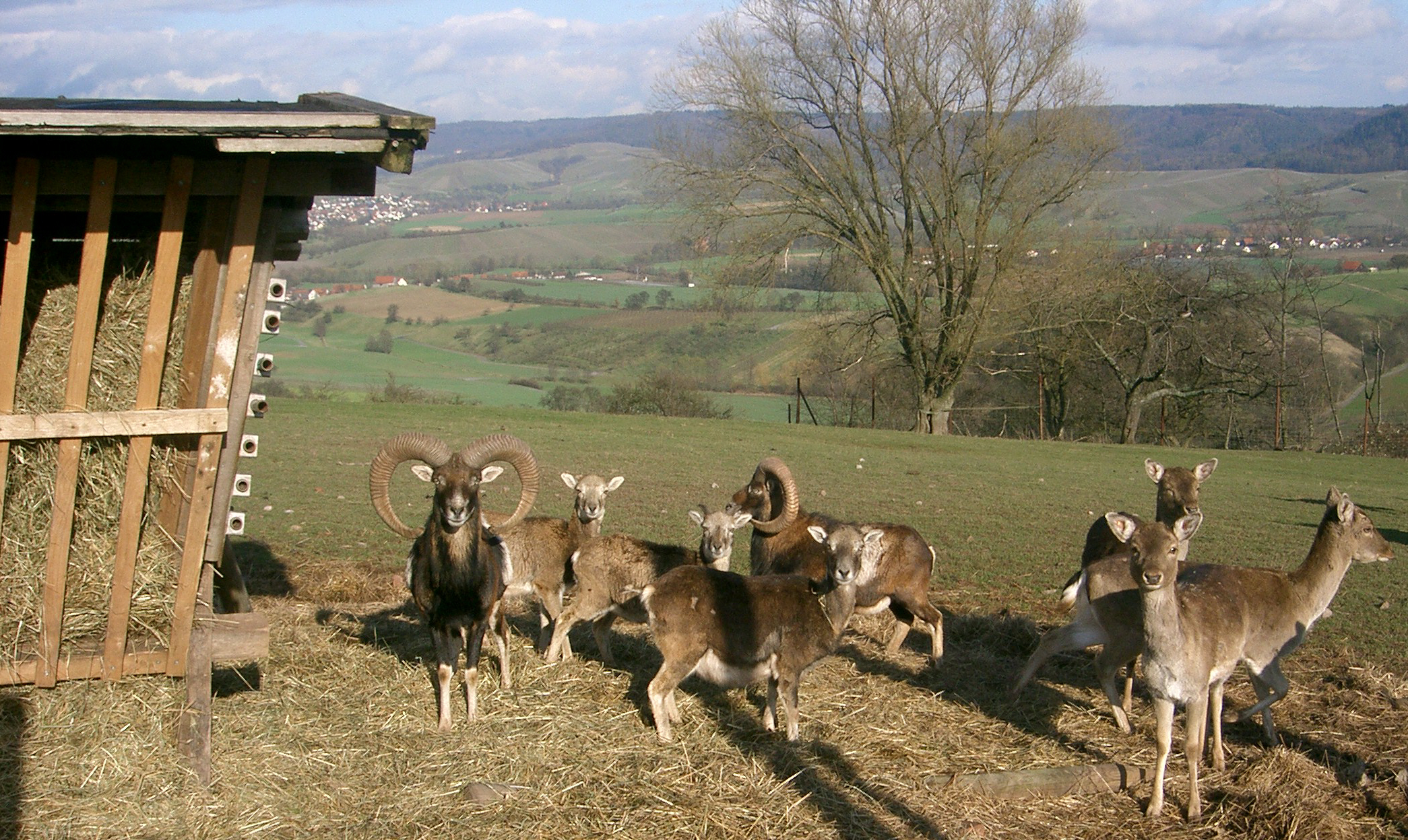 Damwild (rechts) und Mufflons (links) in Pfedelbach-Heuberg